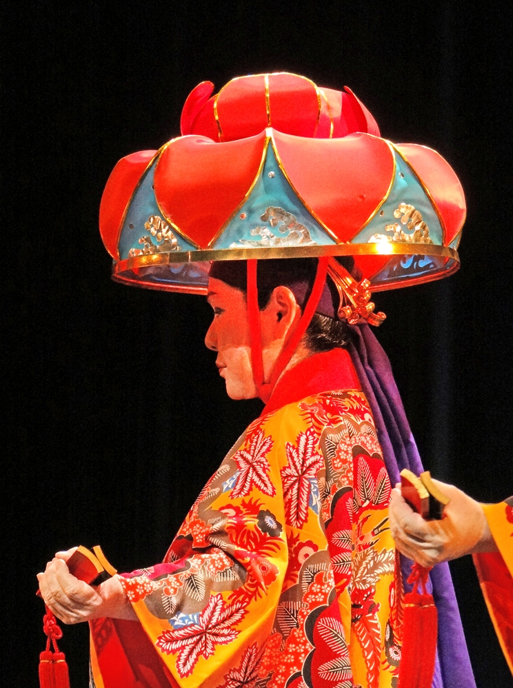 Yotsudake, danse de cour de l'ancien royaume d'Okinawa (Royaume de Ryûkyû : 1429-1879), effectuée lors de l'accueil des Ambassadeurs de Chine, pays avec lequel les liens étaient étroits